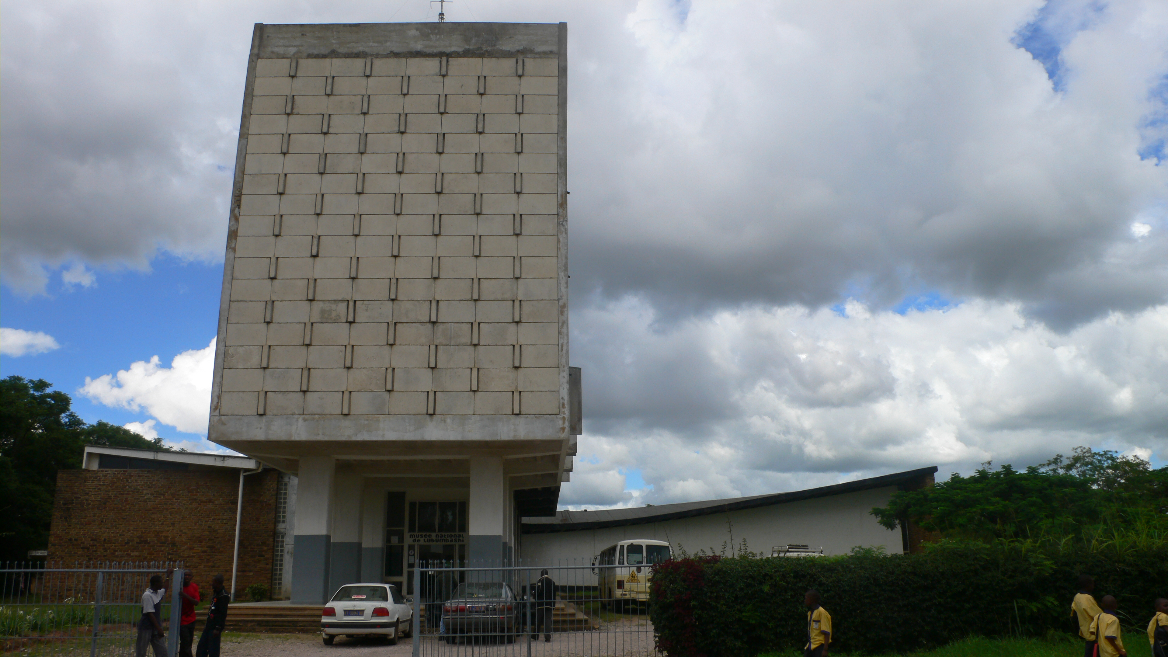 Musée national de Lubumbashi, République démocratique du Congo (RDC)